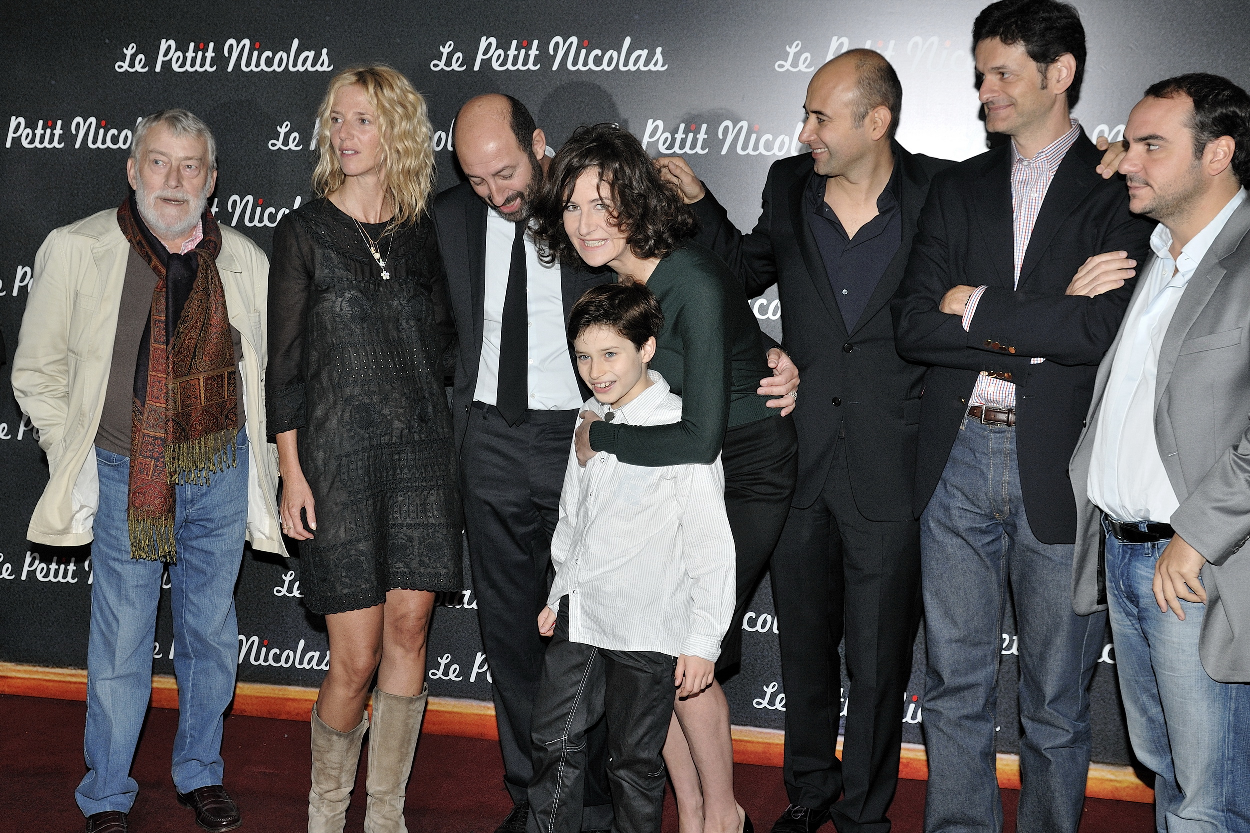 Avant-première du film Le petit Nicolas au Grand Rex, à Paris, le 20 Septembre 2009, en présence de toute l'équipe de film. De gauche à droite : Michel Duchaussoy, Sandrine Kiberlain, Kad Merad, Maxime Godart, Valérie Lemercier, Laurent Tirard, (?) et François-Xavier Demaison.